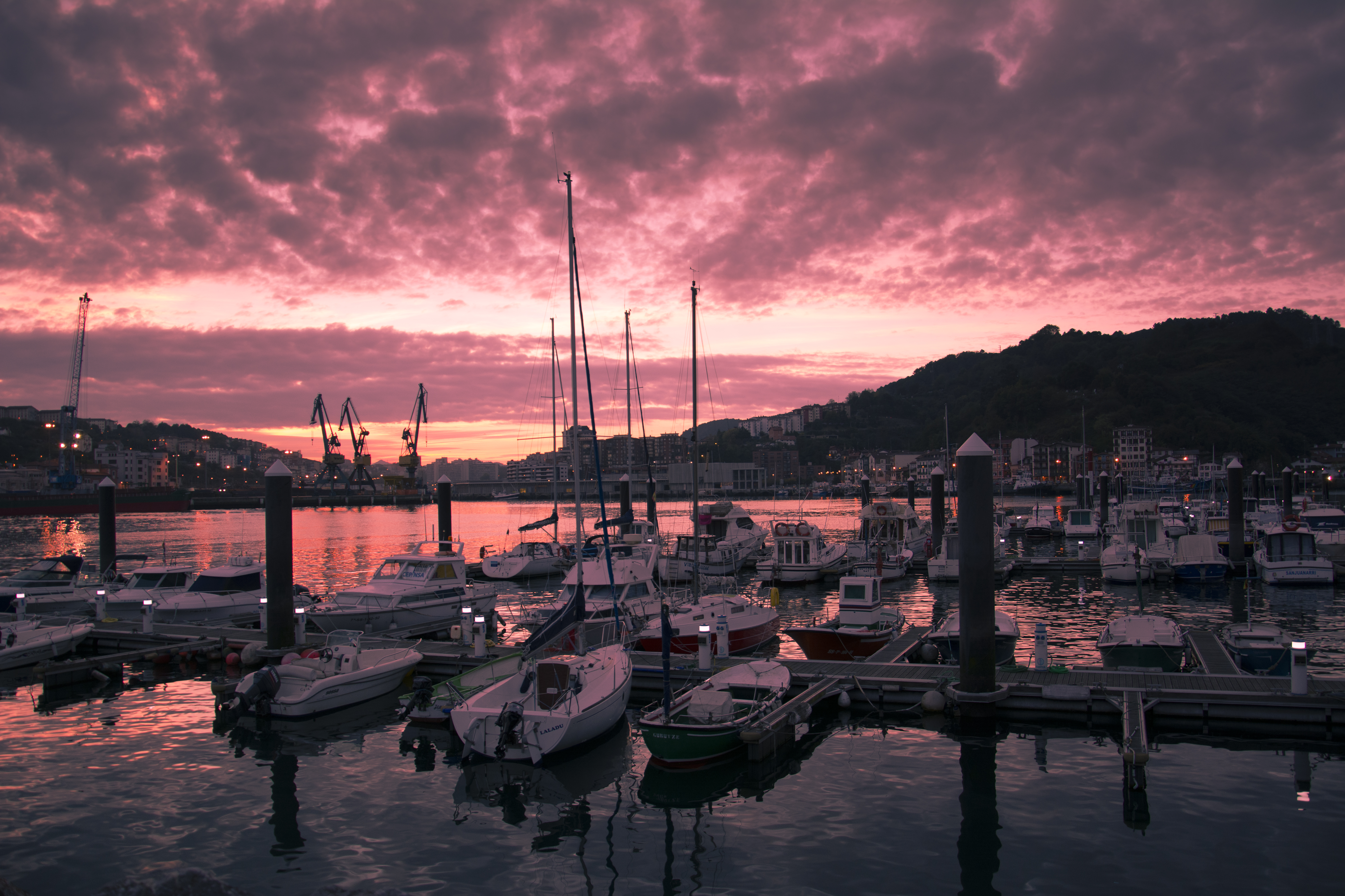 Monte Ulia desde Pasai Donibane (Atardecer) This is a photography of a Site of Community Importance in Spain with the ID: ES2120014. Natura2000 entry, EEA entry